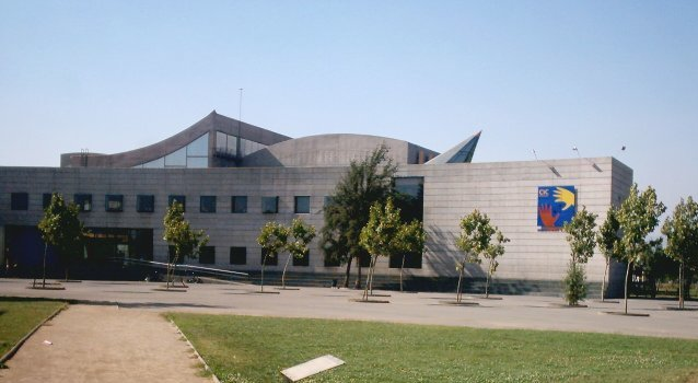 Edificio del Museo Interactivo Mirador en Santiago de Chile. Enero de 2006.